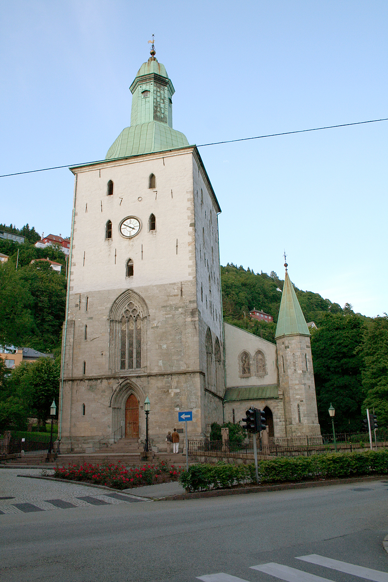 Bergen domkirke